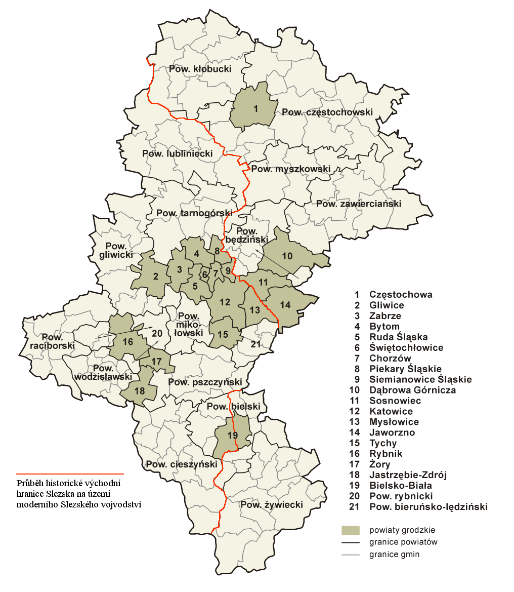 Průběh hranice mezi Republika obou národů a země Koruny české z aktuální mapy moderního Slezského vojvodství, považována za moderní hranici mezi Slezskem a Malopolsko